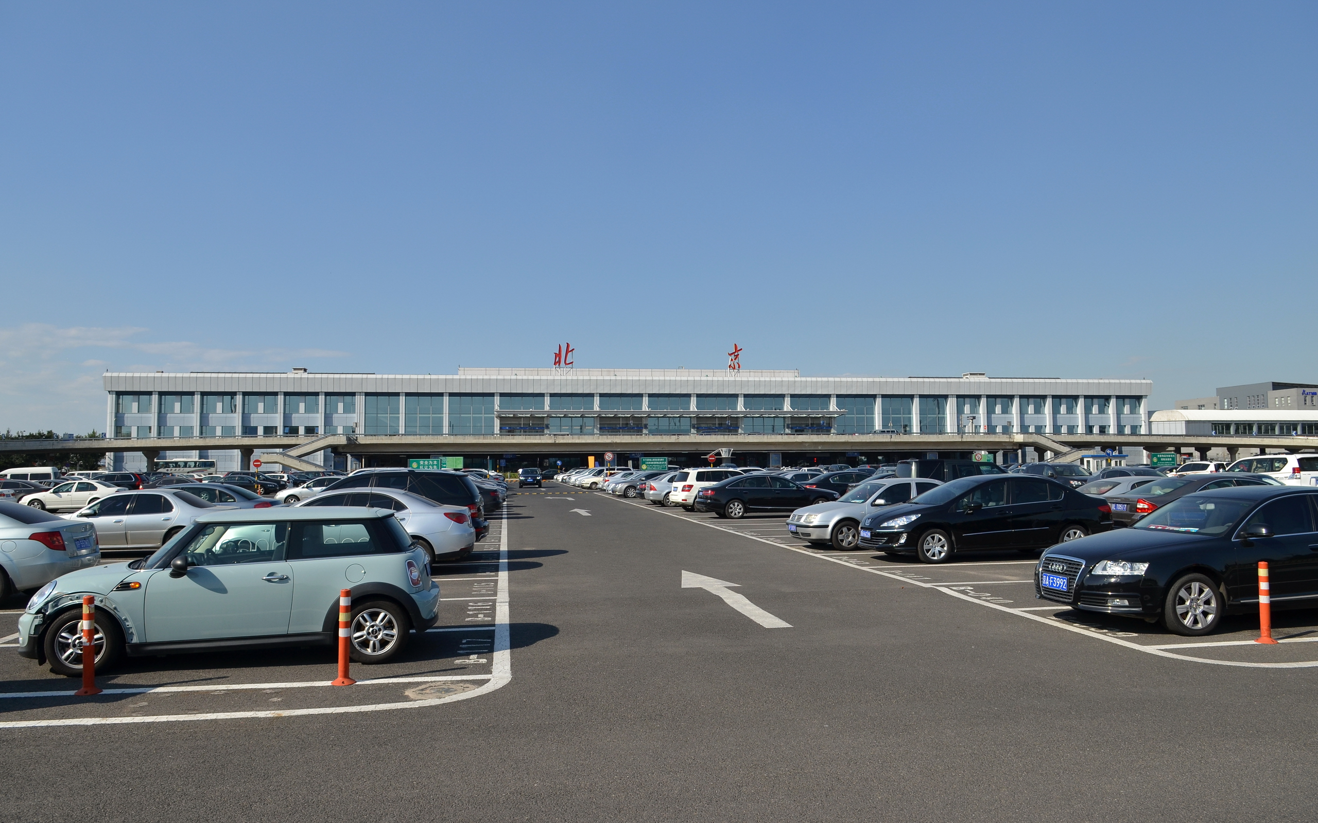 中文（中国大陆）: 北京首都国际机场1号航站楼